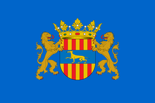 Bandera del municipio